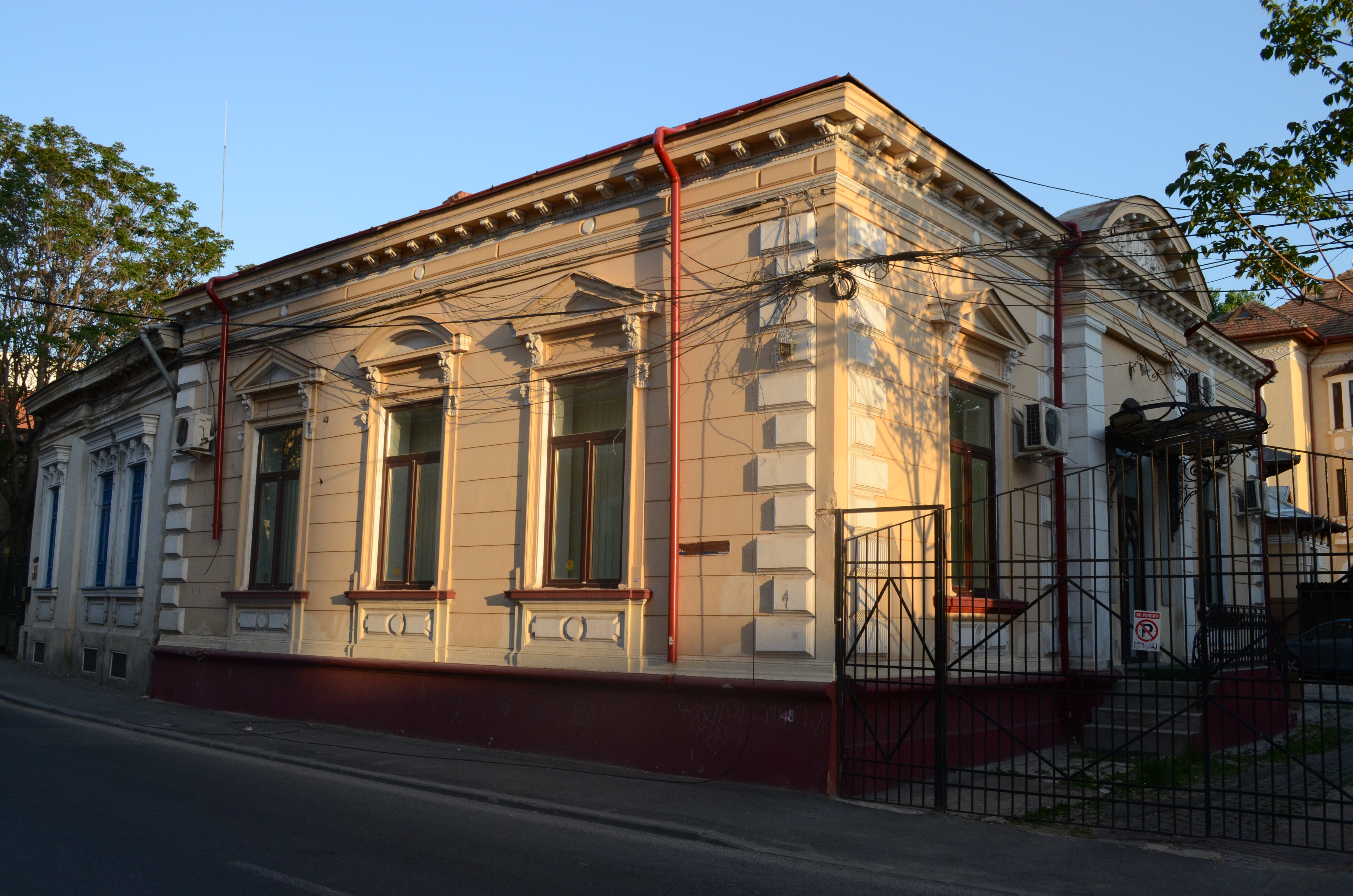 Casă, Strada Matei Basarab nr. 48, Sector 3, București